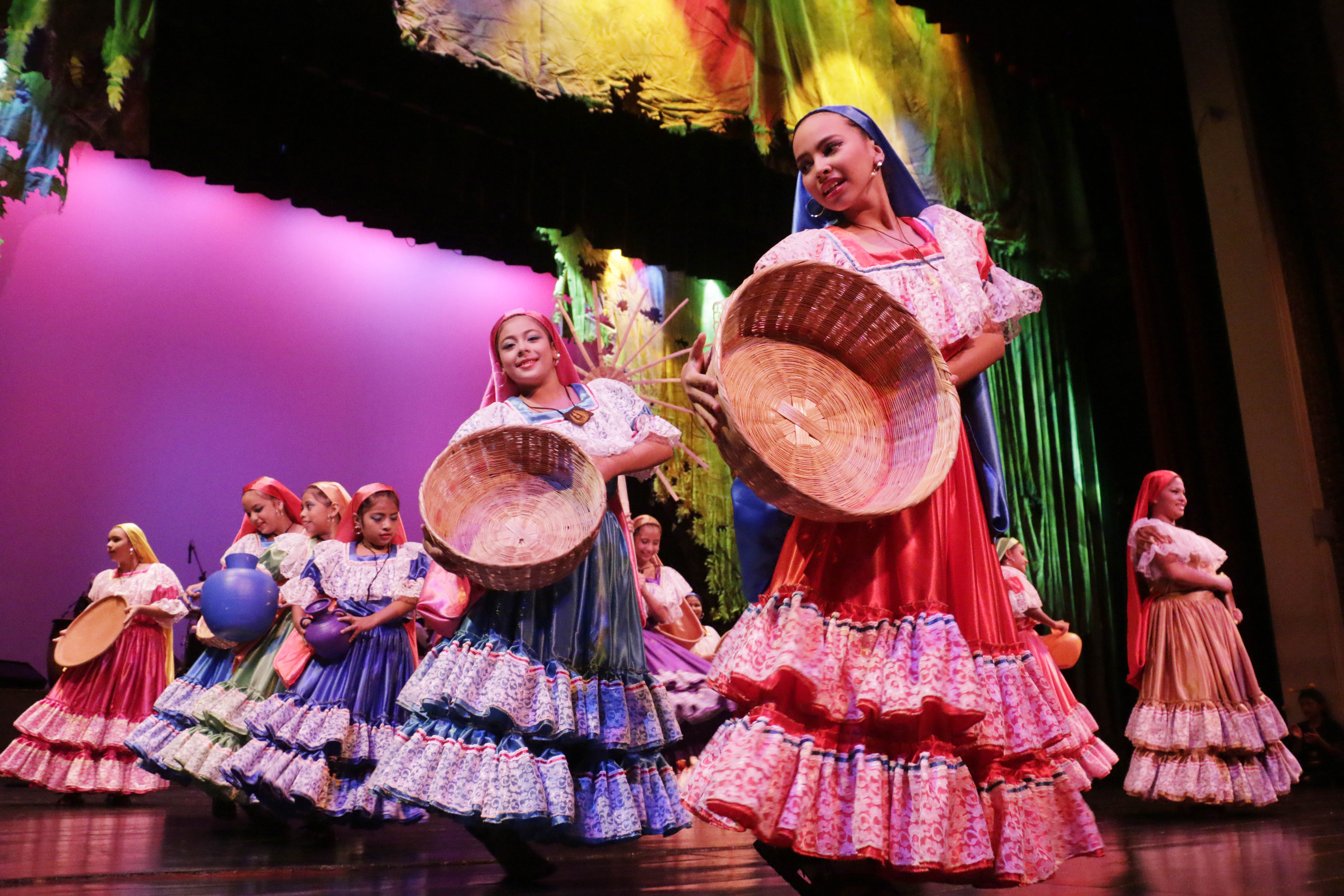 La Colmenita de El Salvador.